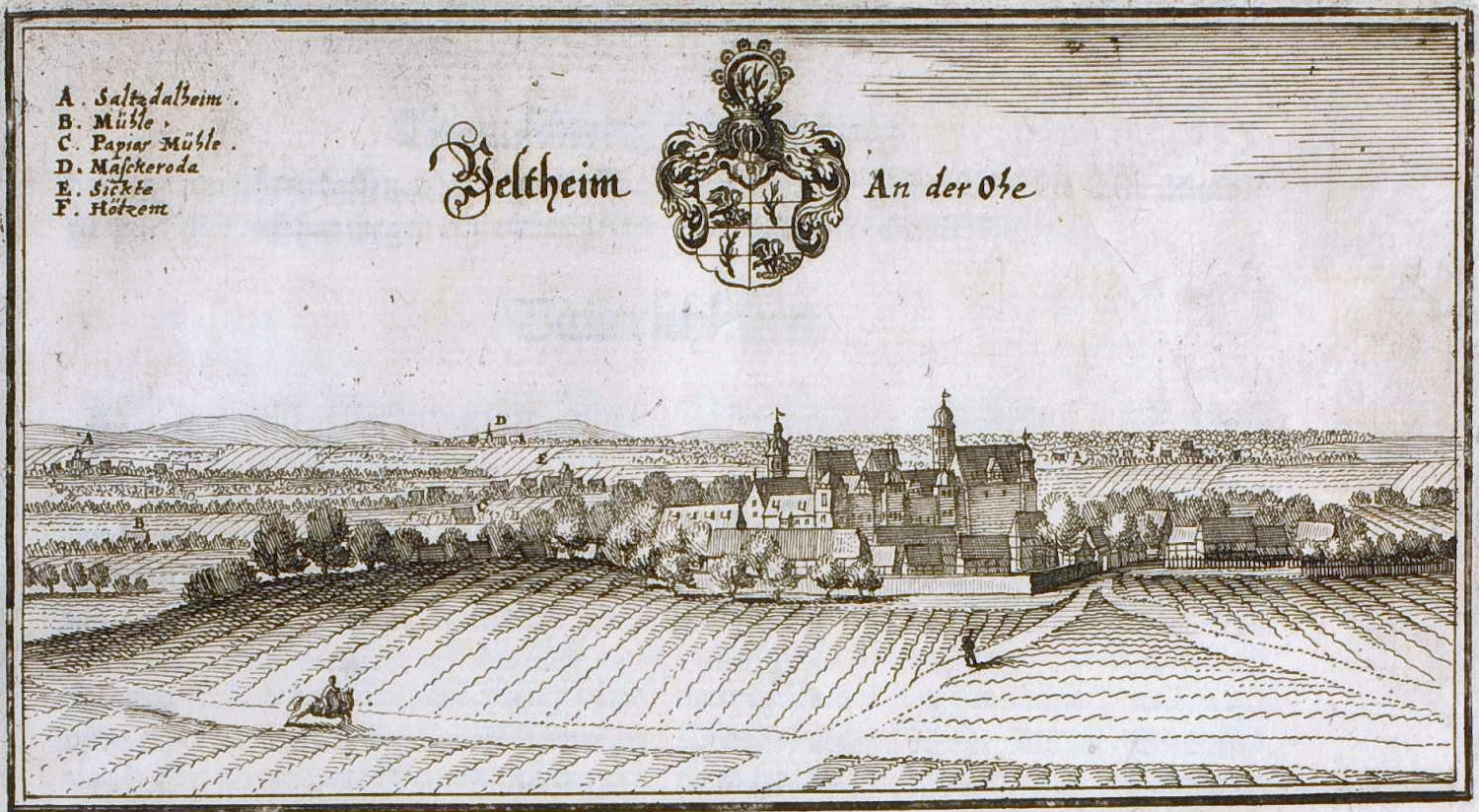 File:Veltheim Merian Braunschweig Lüneburg.jpg